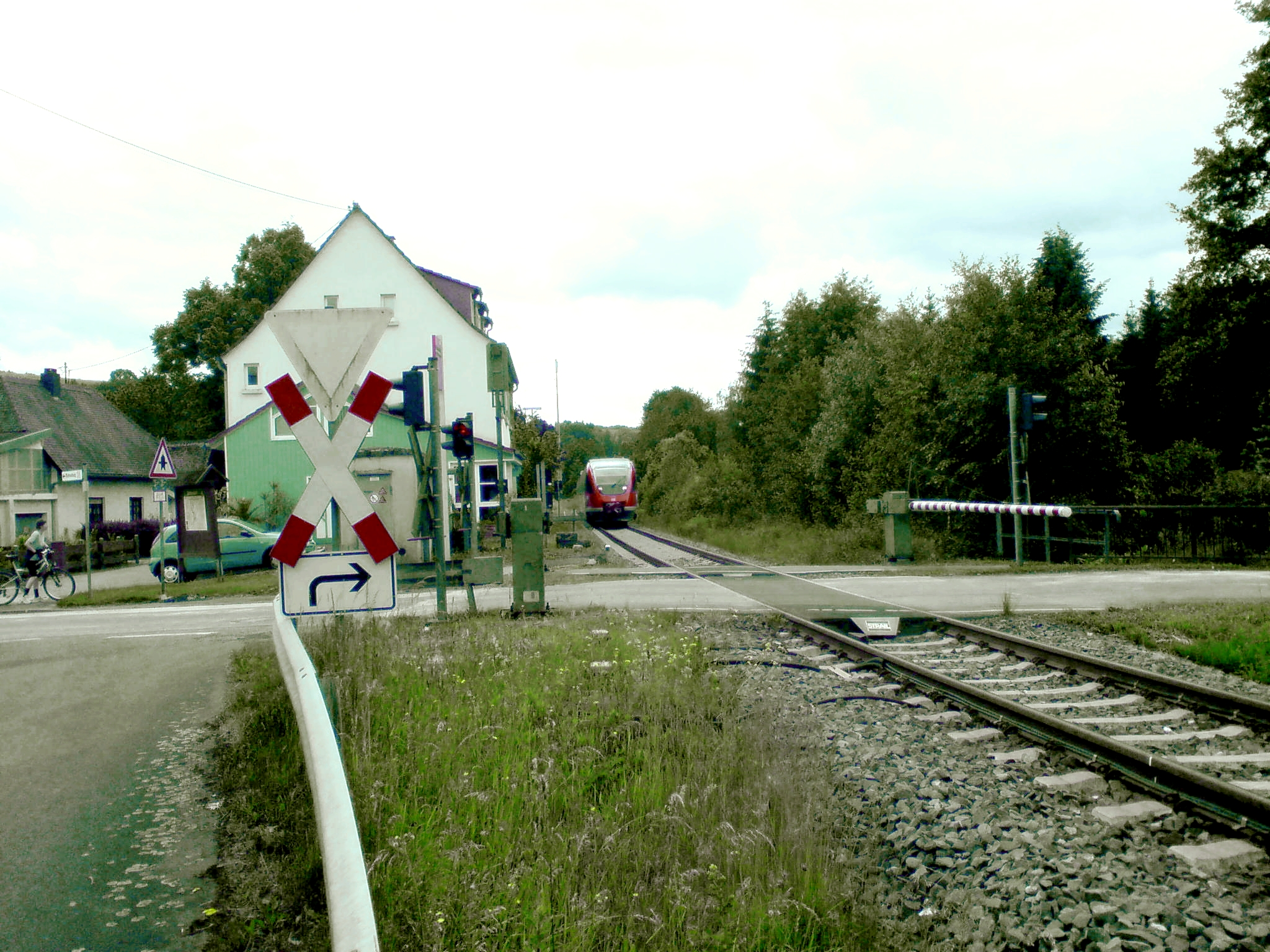 Zug am Haltepunkt Matzenbach